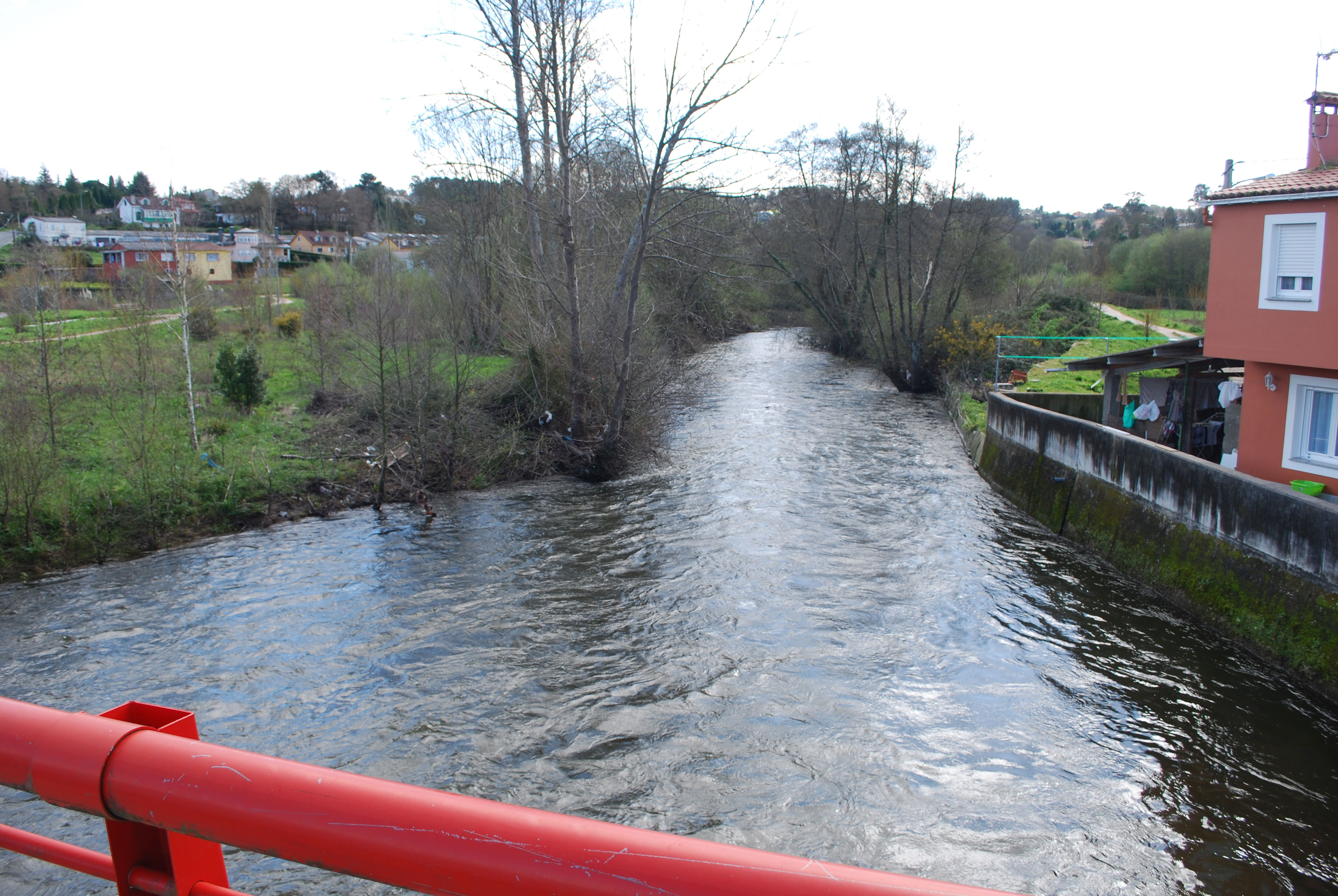 Río Mero ao paso por Cambre, A Coruña, Galicia, Spain